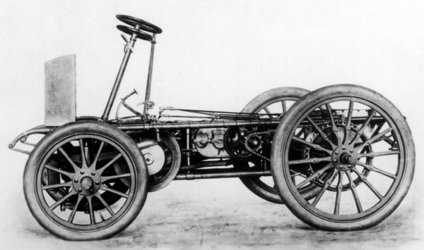 Châssis tubulaire Voiture Audibert et Lavirotte 1898.